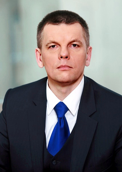 Einars Repše, biedrības Latvijas attīstībai vadītājs